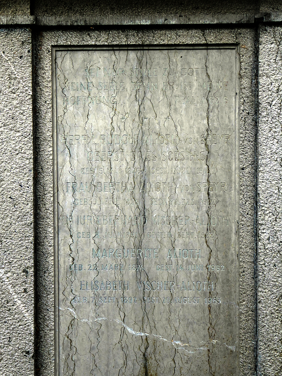 Elisabeth Vischer-Alioth (1892–1963) Frauenrechtlerin, Journalistin, Politikerin. Grab auf dem alten Friedhof von Arlesheim, Basel-Land